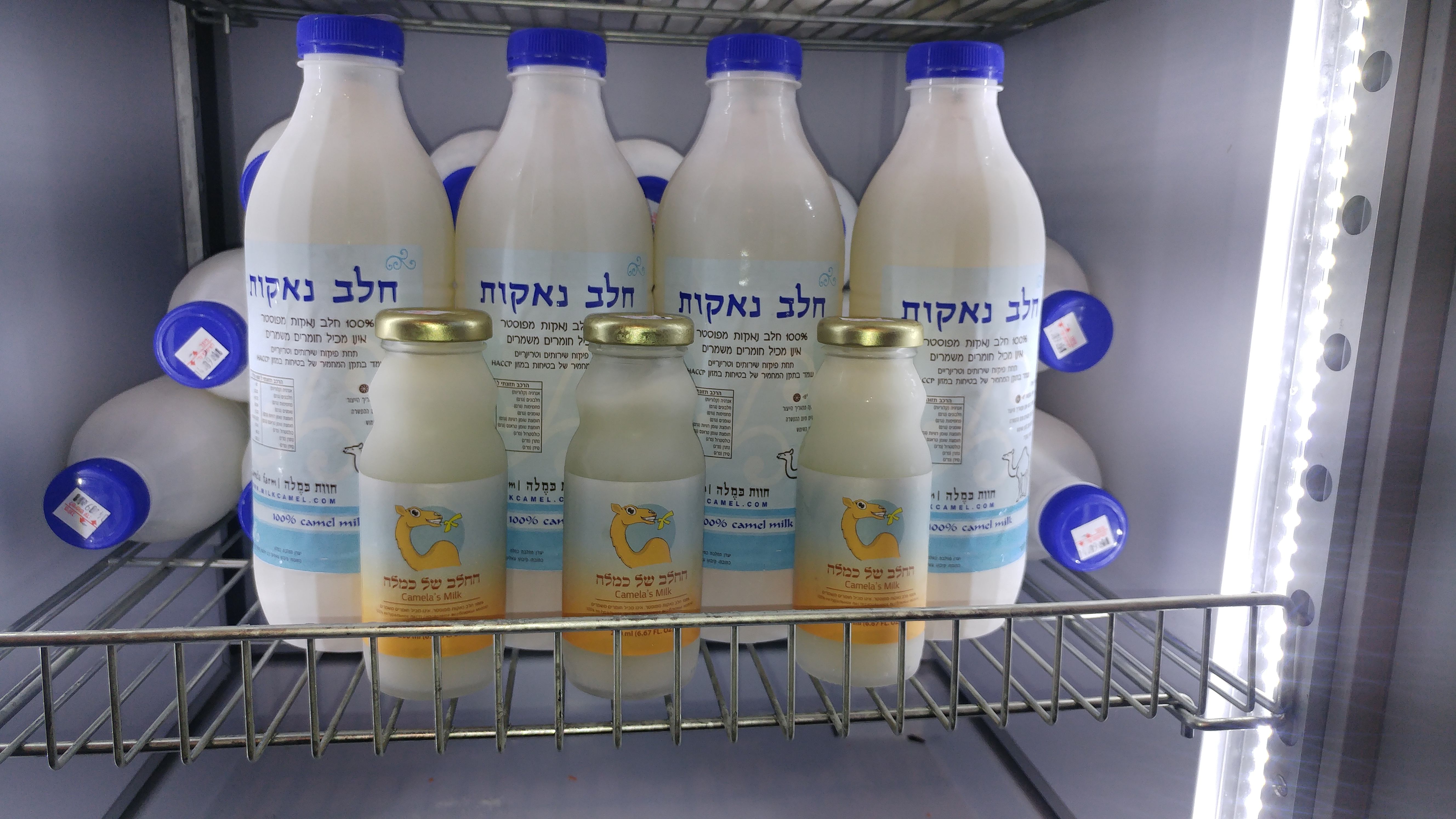 מוצרי חלב נאקות מישראל